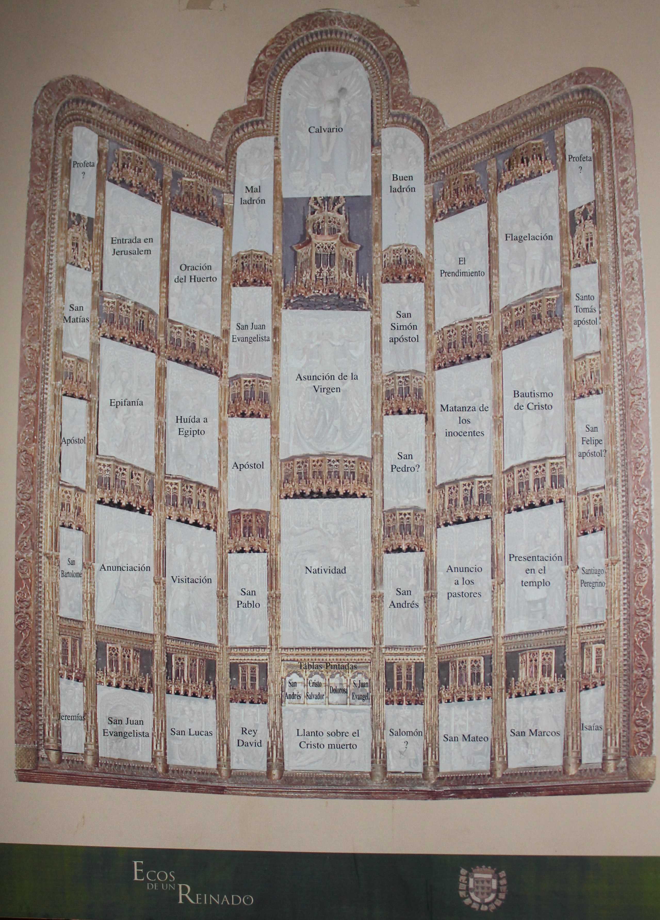 Esquema iconográfico del retablo mayor de Santa María de la Asunción de Dueñas